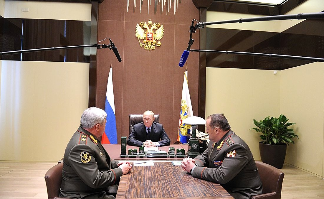 Генерал-лейтенант Сергей Меликов и Президент России Владимир Путин на встрече в Сочи, 12 мая 2014 года